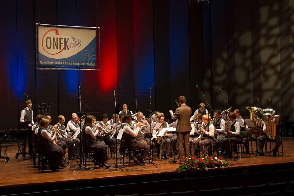 De Koninlijke Fanfare Sint-Cecilia De Zwaan op zaterdag 9 april 2016